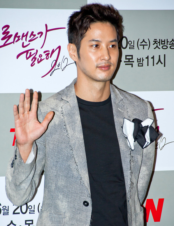 tvN 드라마 로맨스가 필요해 2012의 제작 발표회에 참석한 김지석